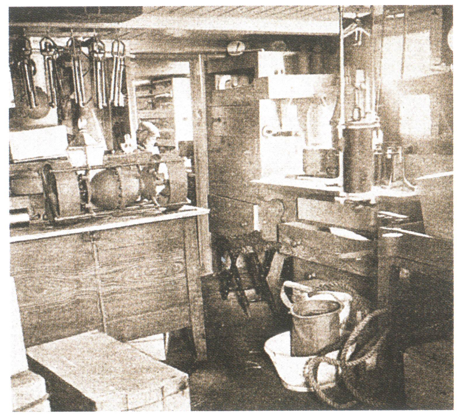 Гидрологическая лаборатория на яхте "Заря"